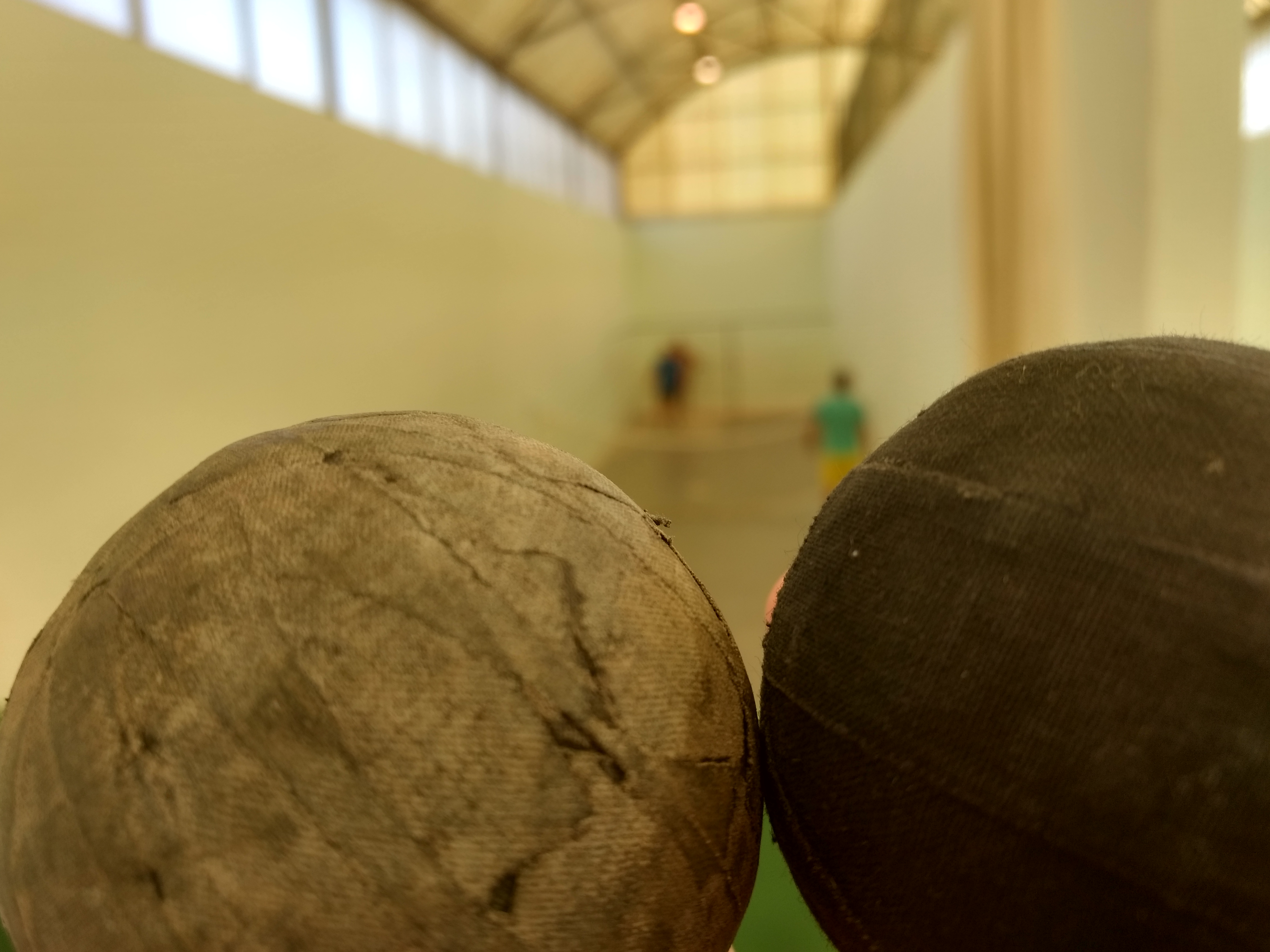 Pilotes de Monòver, utilitzades a les Galotxetes i les Llonges. Al fons, canxa del Pinós.